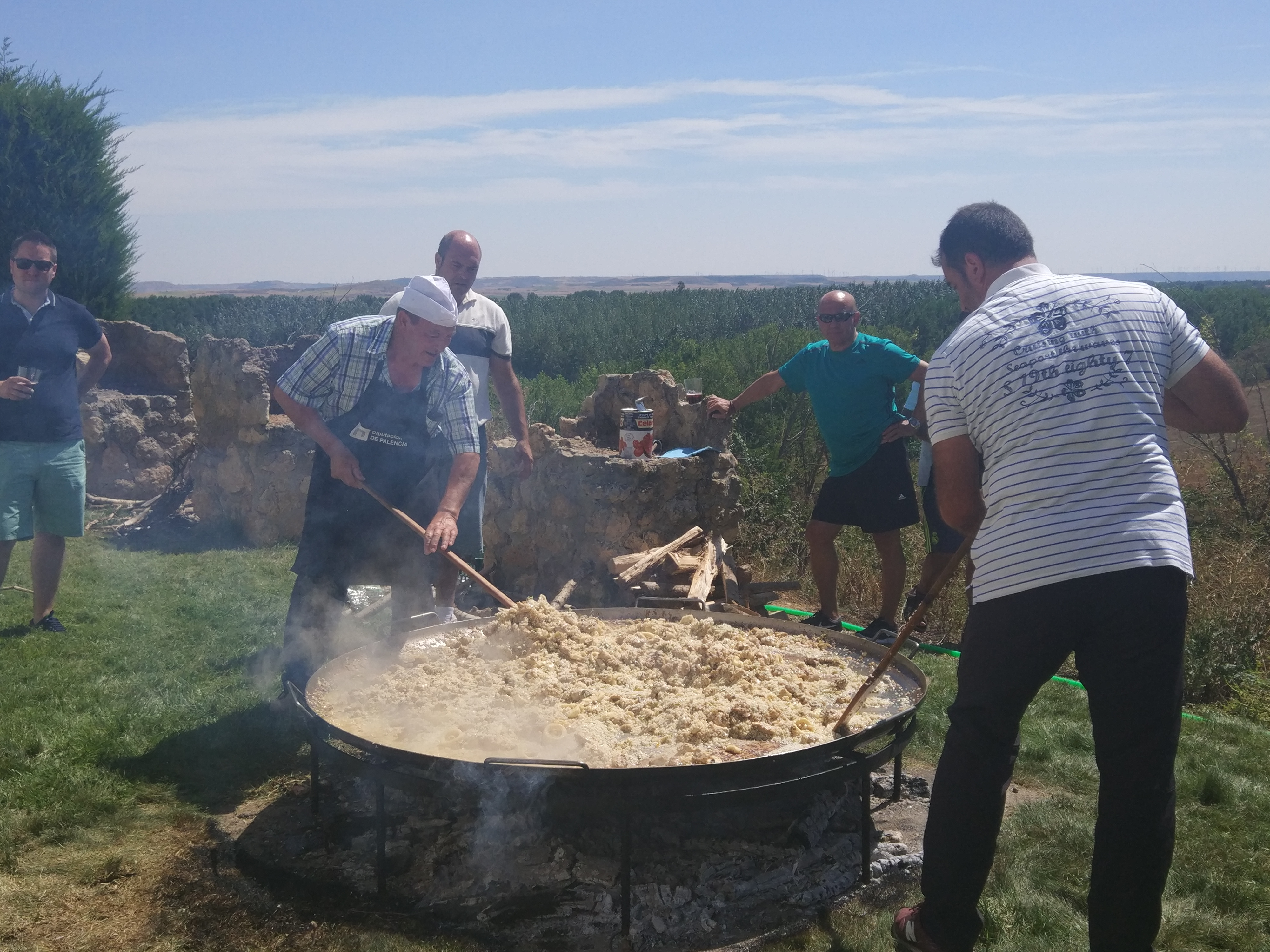 Día del Emigrante en Osornillo (Palencia)